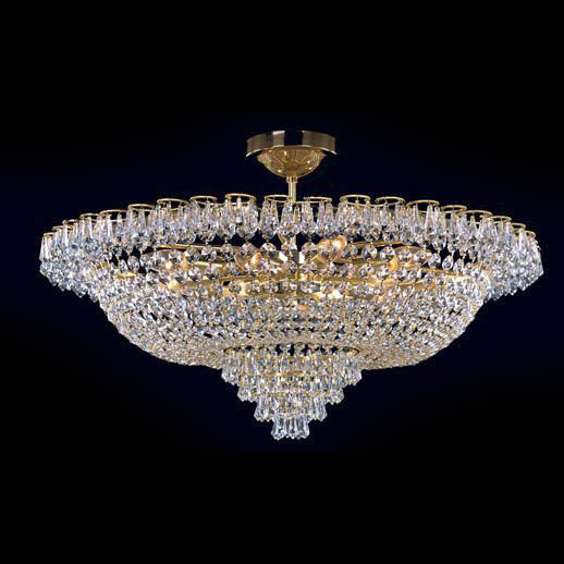 Классическая хрустальная люстра фирмы Preciosa